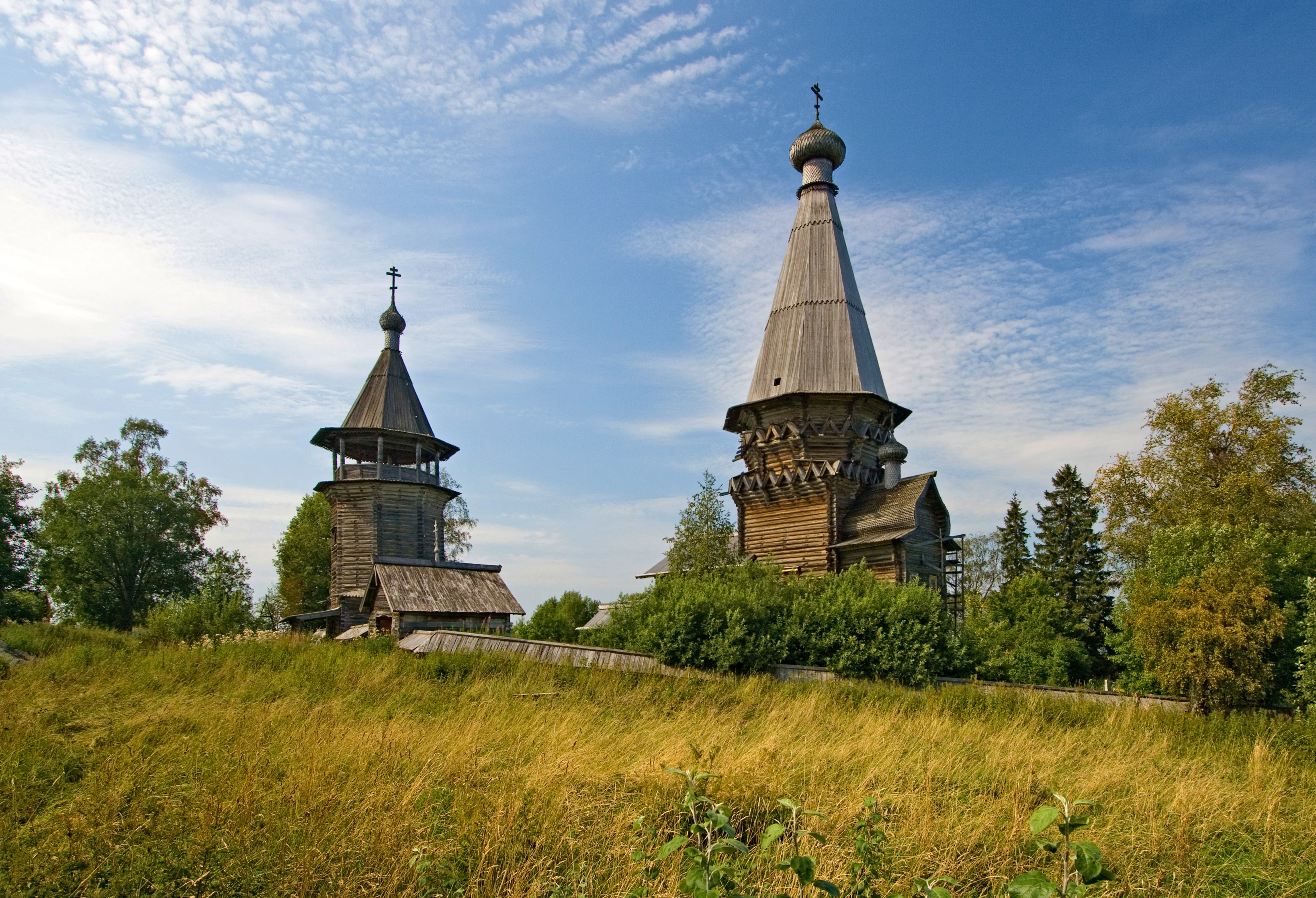 Гимрека, Ленинградская область